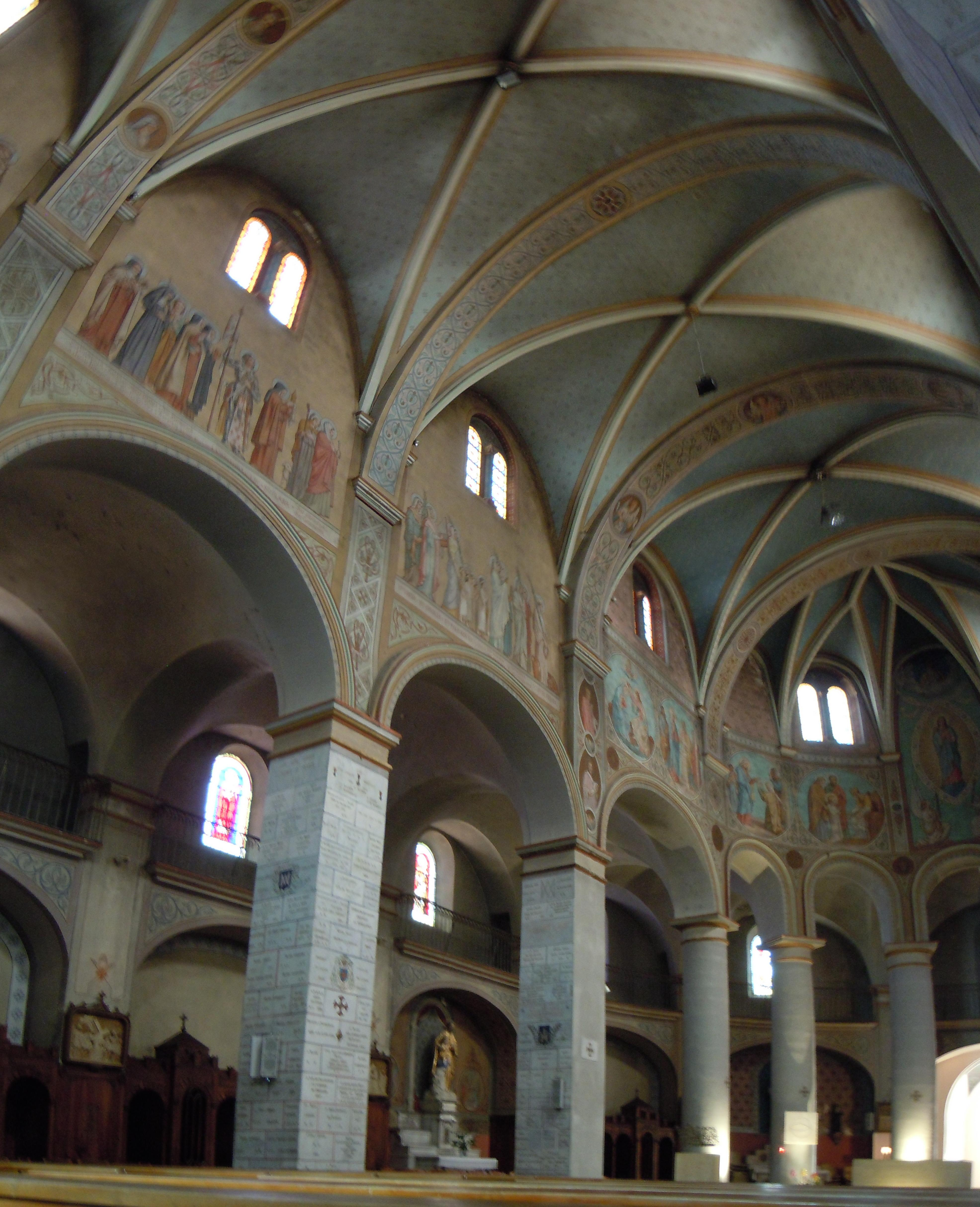 Basilique Notre-Dame de Bon Secours - vue du collatéral nord et de la nef - Lablachère - Ardèche - France